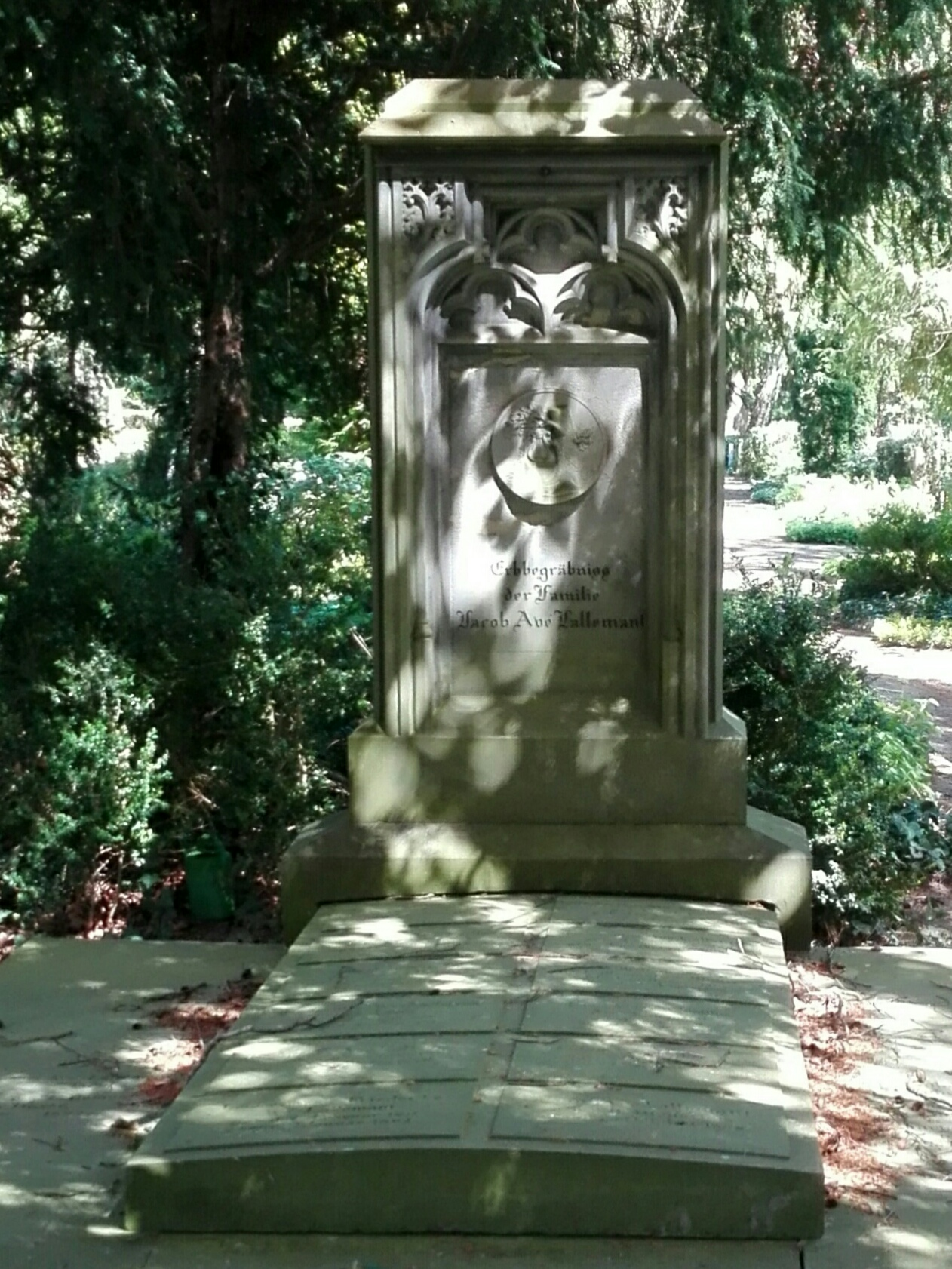 Das Familiengrab derer von Avé-Lallemant auf dem Burgtorfriedhof in Lübeck.